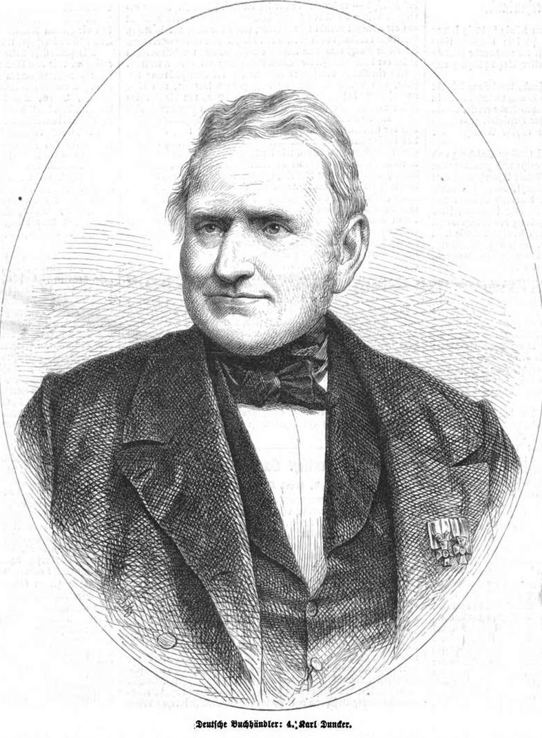 Karl Friedrich Wilhelm Duncker, 1867, deutscher Buchhändler und Verleger im 19. Jh.